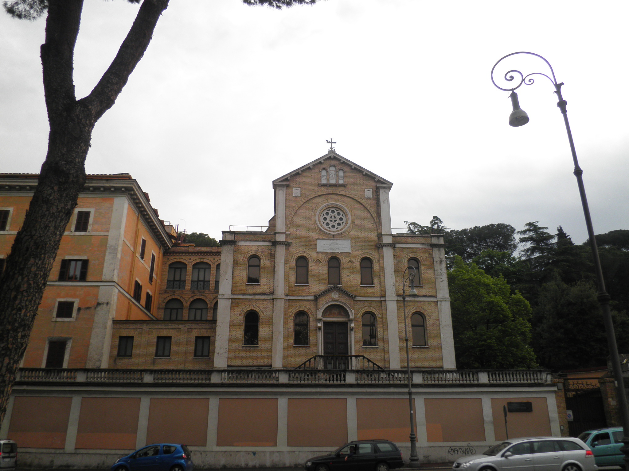 Roma, san Vincenzo de Paoli a Ripa